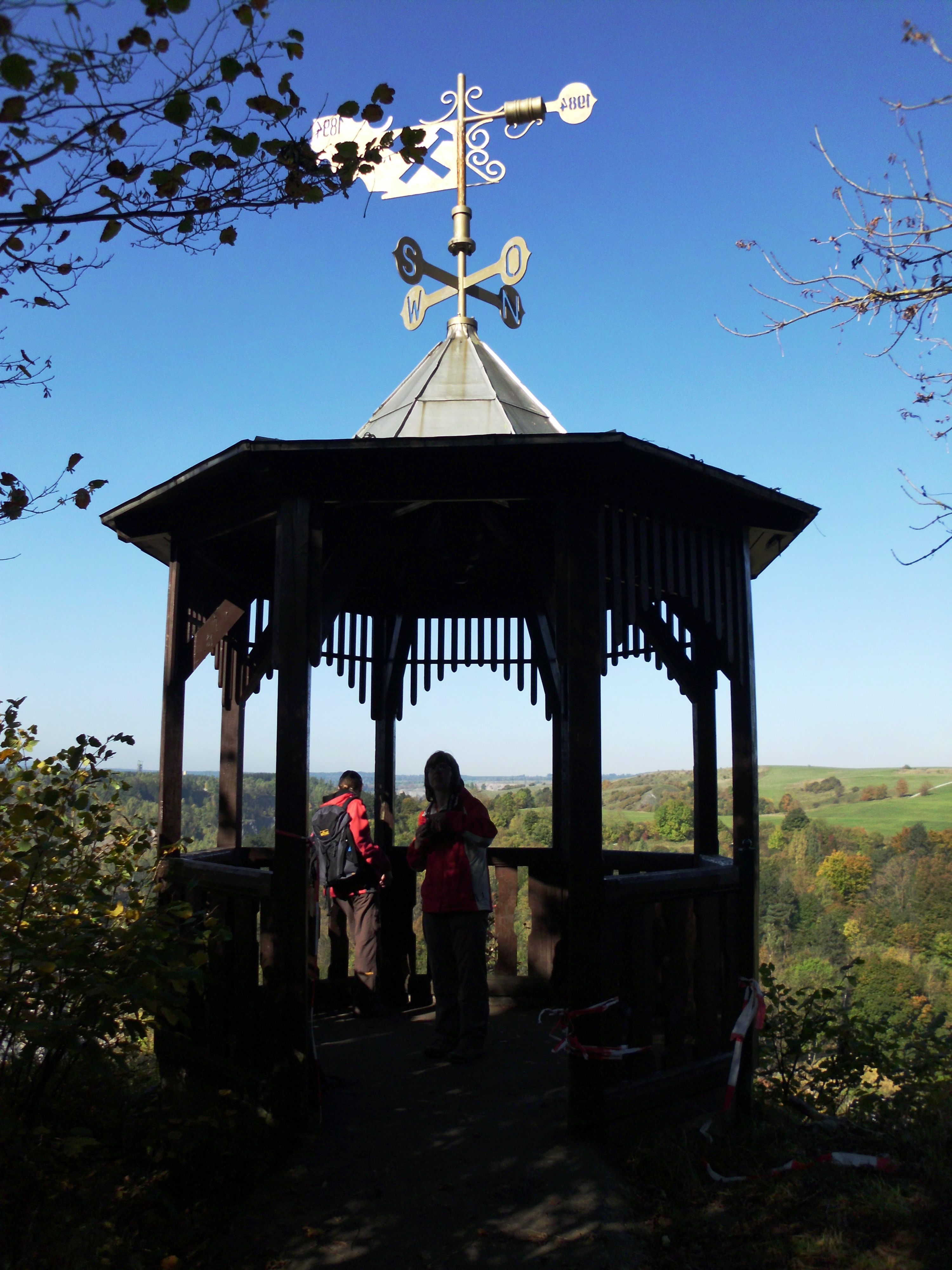 Aussichtspavillon am Hohen Kleef, Rübeland, Stadt Oberharz am Brocken